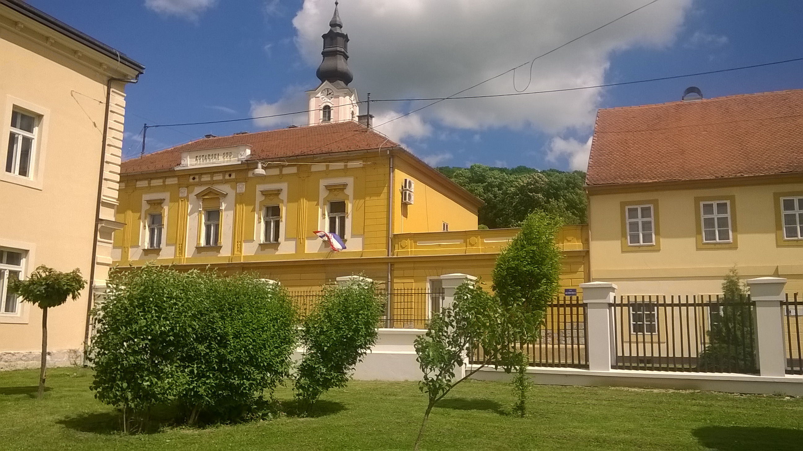 Pakrac, Ortszentrum